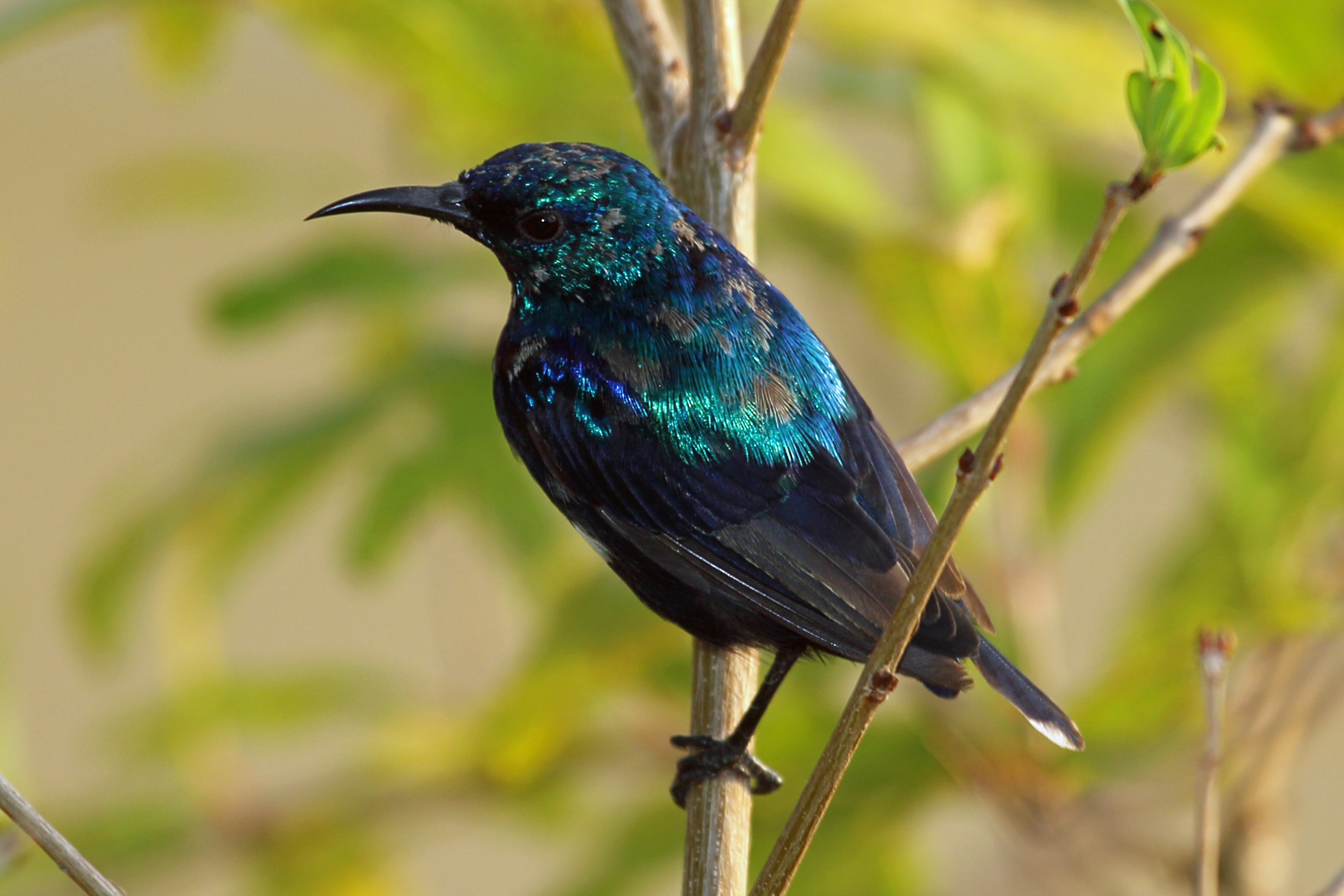 Pemba Sunbird, Manta Resort, Pemba Island